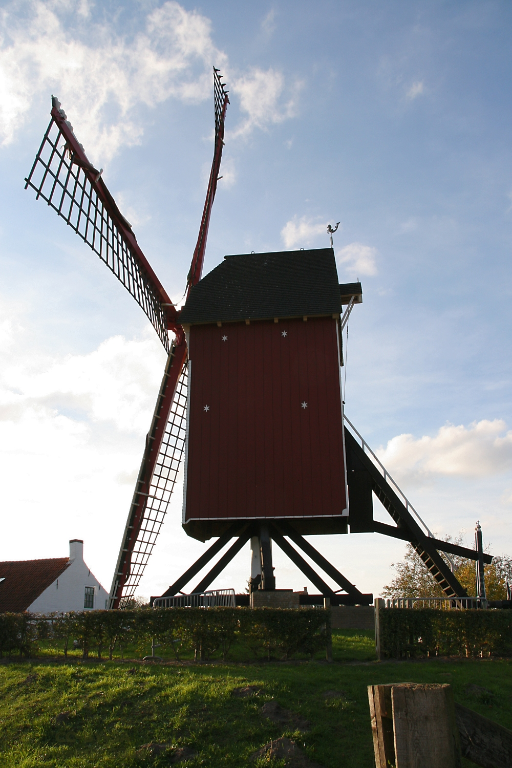 SRetranchement - standerdmolen, en profil